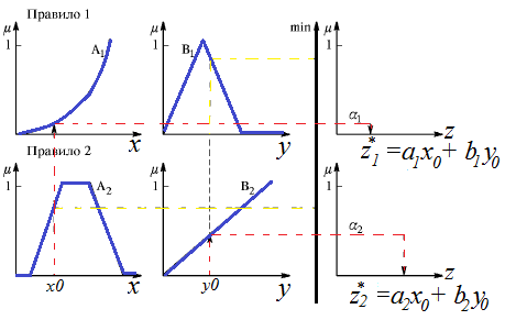 Алгоритм Сугено 1-порядку